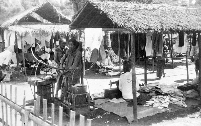 Repronegatief. Markt te Sirangkok, Midden-Java